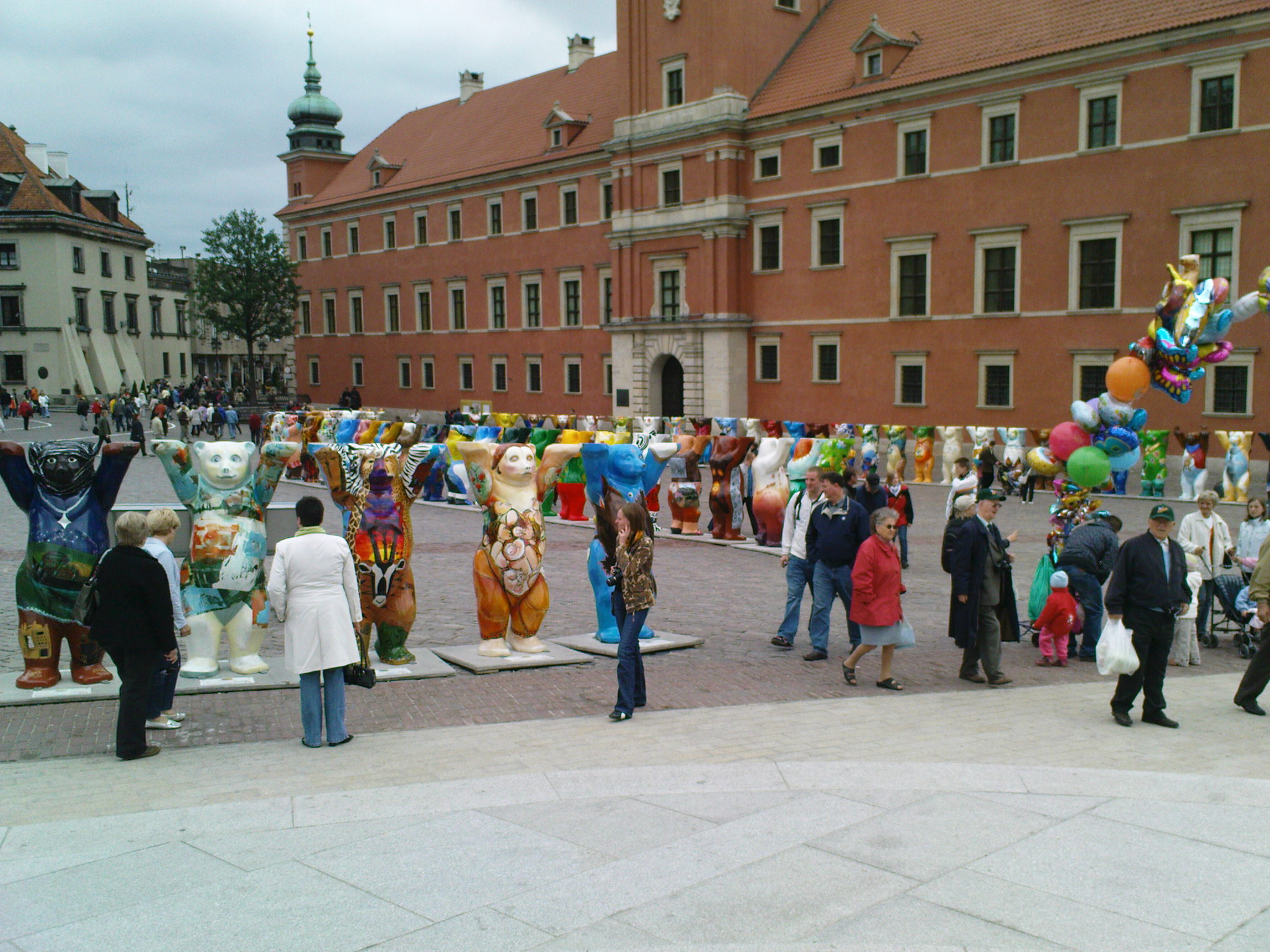 United Buddy Bears Exhibition in Warsaw - pl Zamkowy